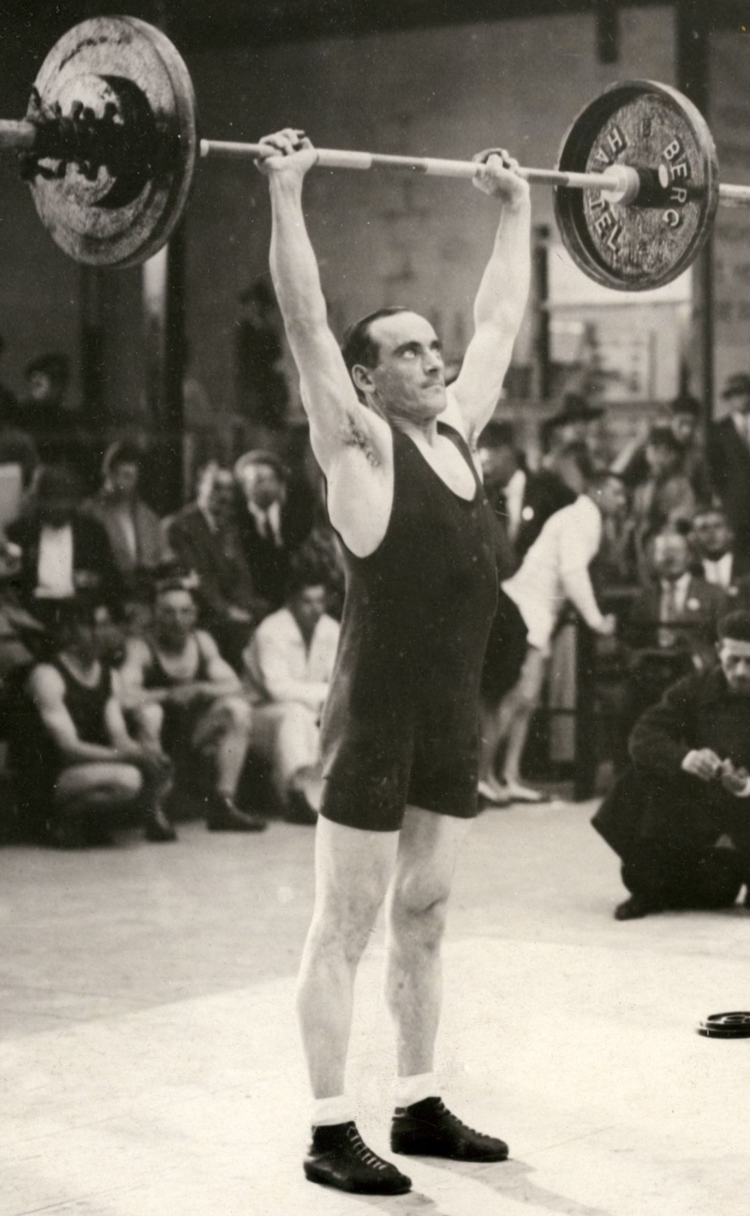 De Nederlander Gerrit Roos tijdens het gewichtheffen in de gewichtsklasse tot 75 kilogram. Olympische Spelen 1928 te Amsterdam, Nederland.